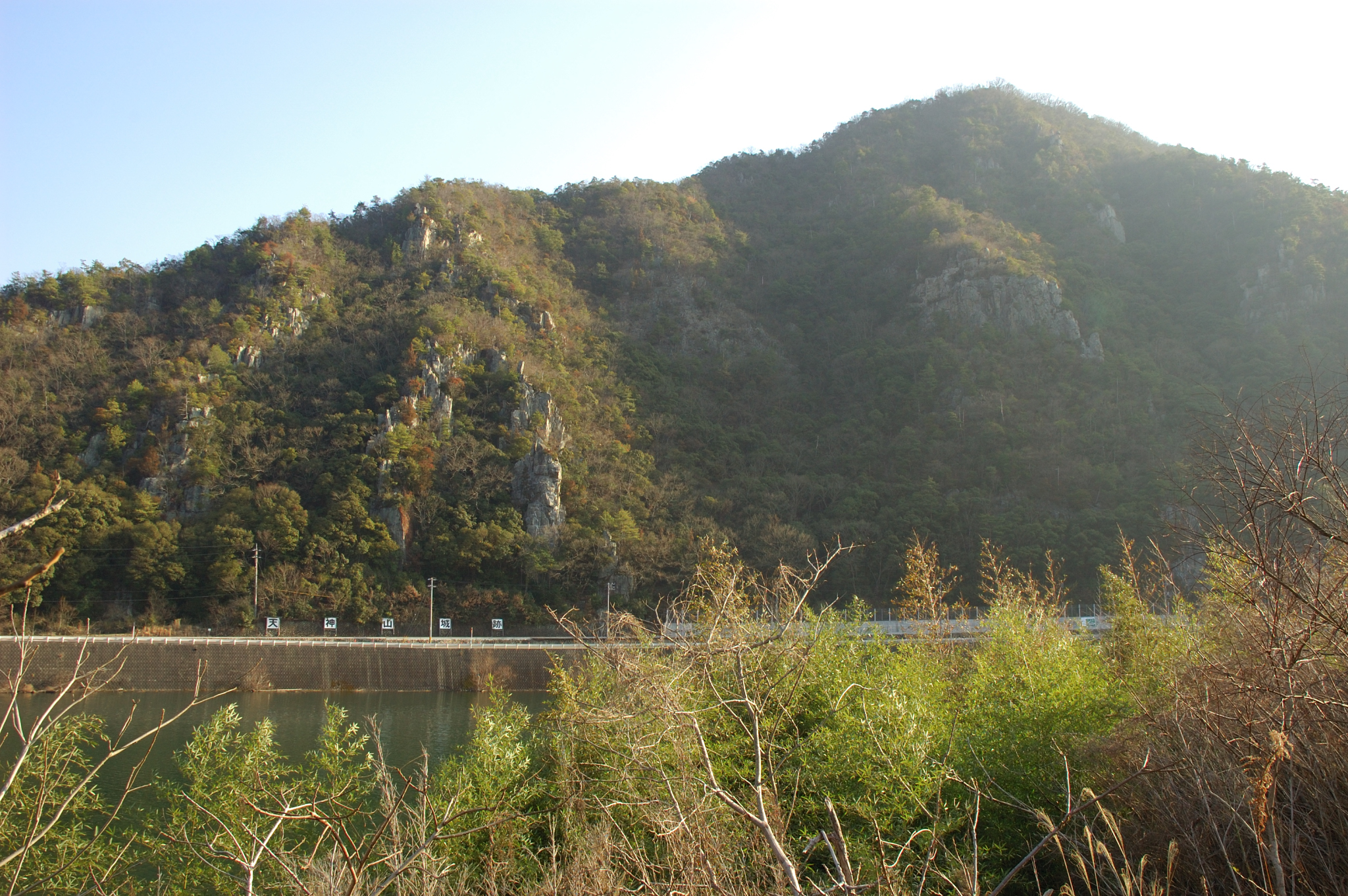 Tenjinyama hill